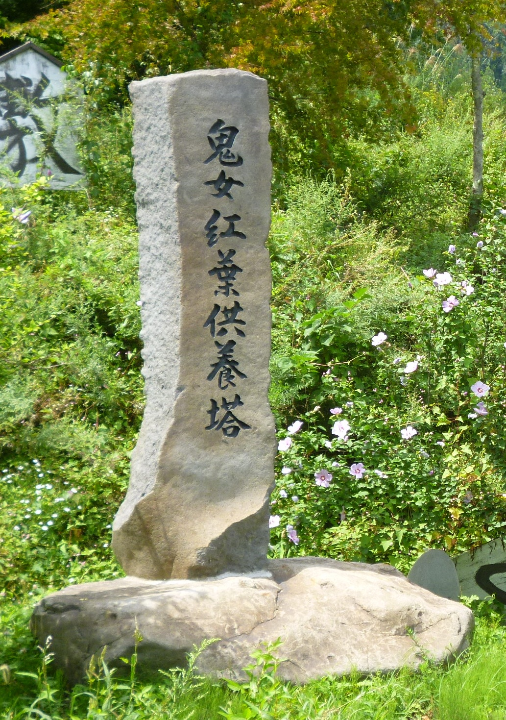 旧鬼無里村根上地区にある内裏屋敷跡地(紅葉が住んだという)の鬼女紅葉供養塔